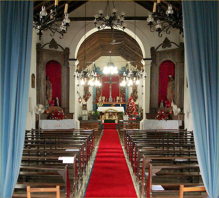 Interior da Igreja de São Domingos, visto do átrio, Torres, Rio Grande do Sul, Brasil.